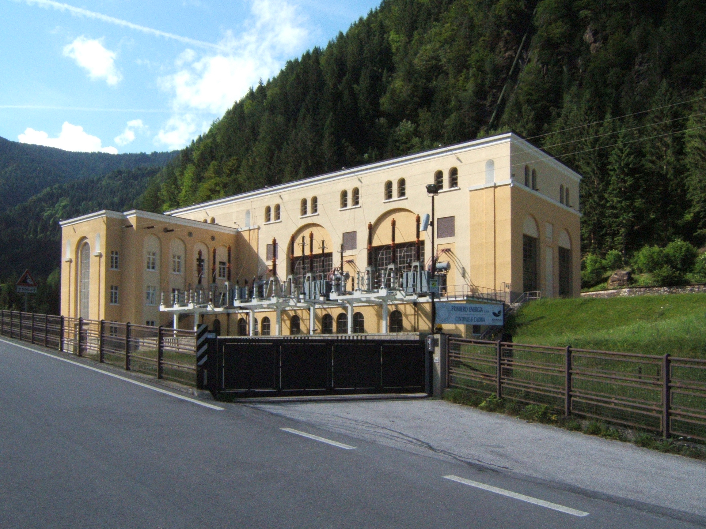 Ohannés Gurekian - Centrale idroelettrica di Caoria - 1941